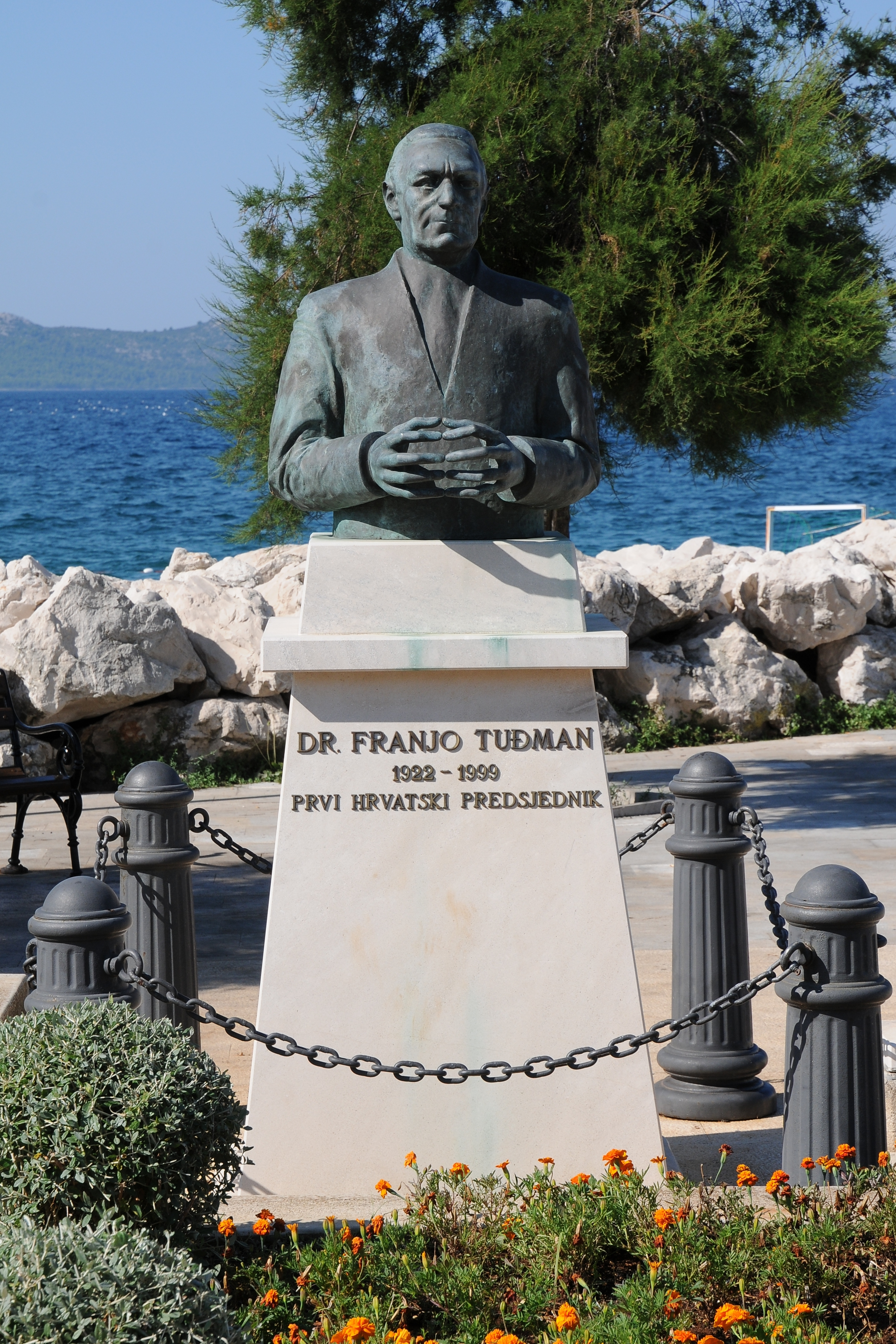 Franjo Tuđman (* 14. Mai 1922 in Veliko Trgovišće (Gespanschaft Krapina-Zagorje); † 10. Dezember 1999 in Zagreb) war ein Offizier, Historiker und Politiker. Er wurde nach den ersten Mehrparteienwahlen in Kroatien zum Präsidenten gewählt und führte das Land in die staatliche Unabhängigkeit. *** Büste gesehen in Diklo, in einem Vorort von Zadar.